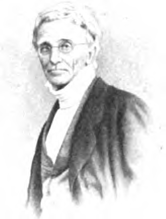 Portrait de Léonard Lugardon dans Une famille de républicains fouriéristes : les Milliet de Paul Milliet (Q3371845), premier volume, page 224.